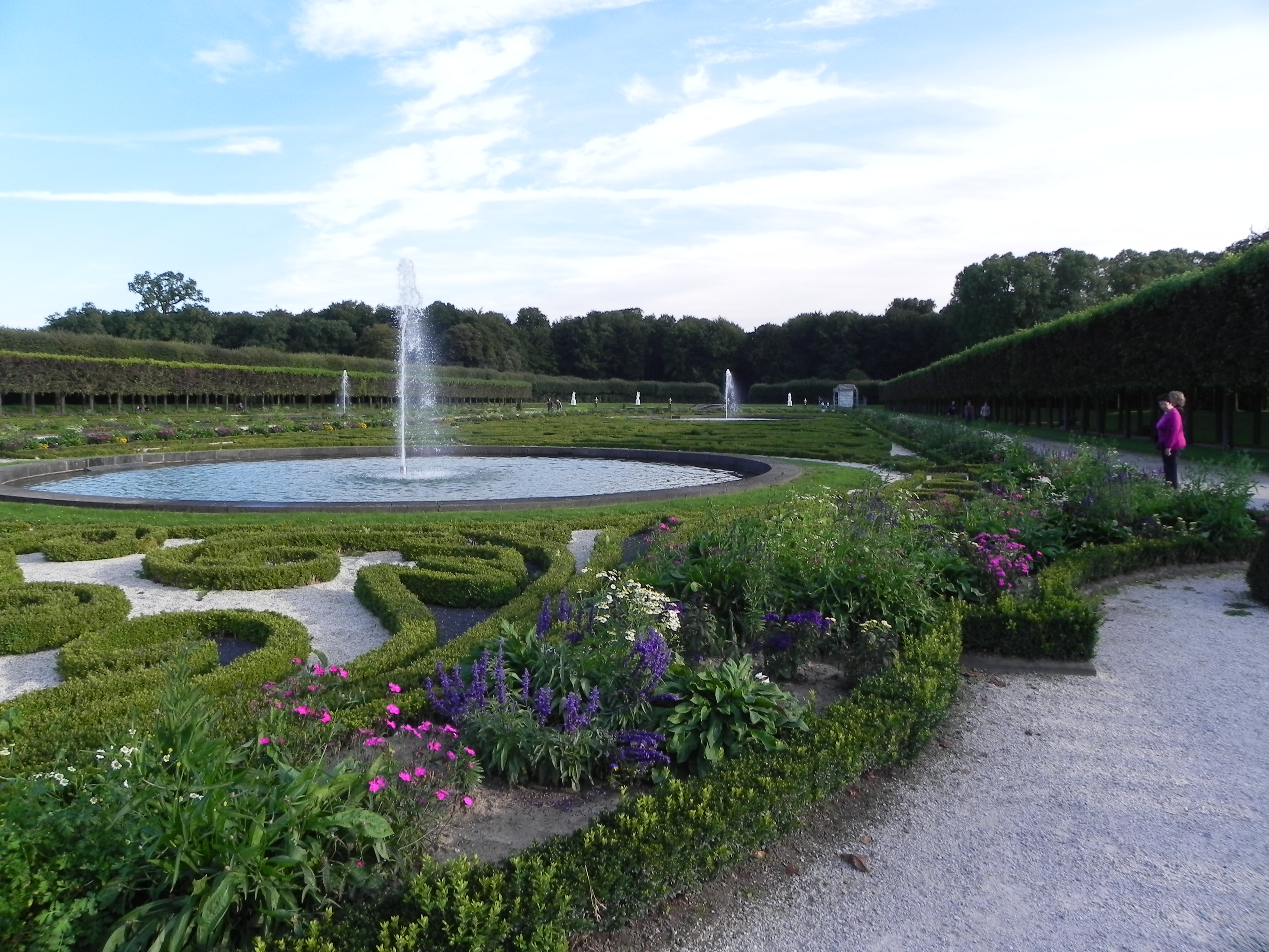 Augustusburg Schlossgarten, Sicht vom Schloss